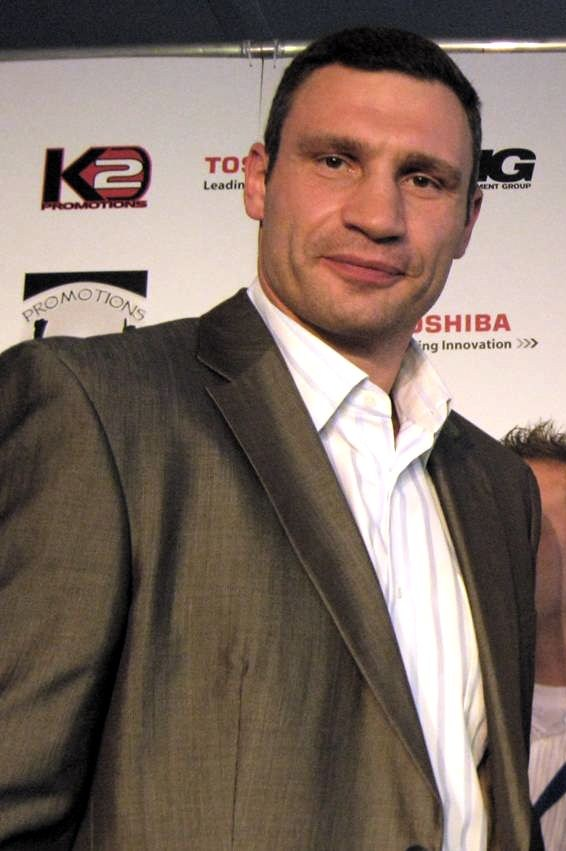 Witalij Kliczko.